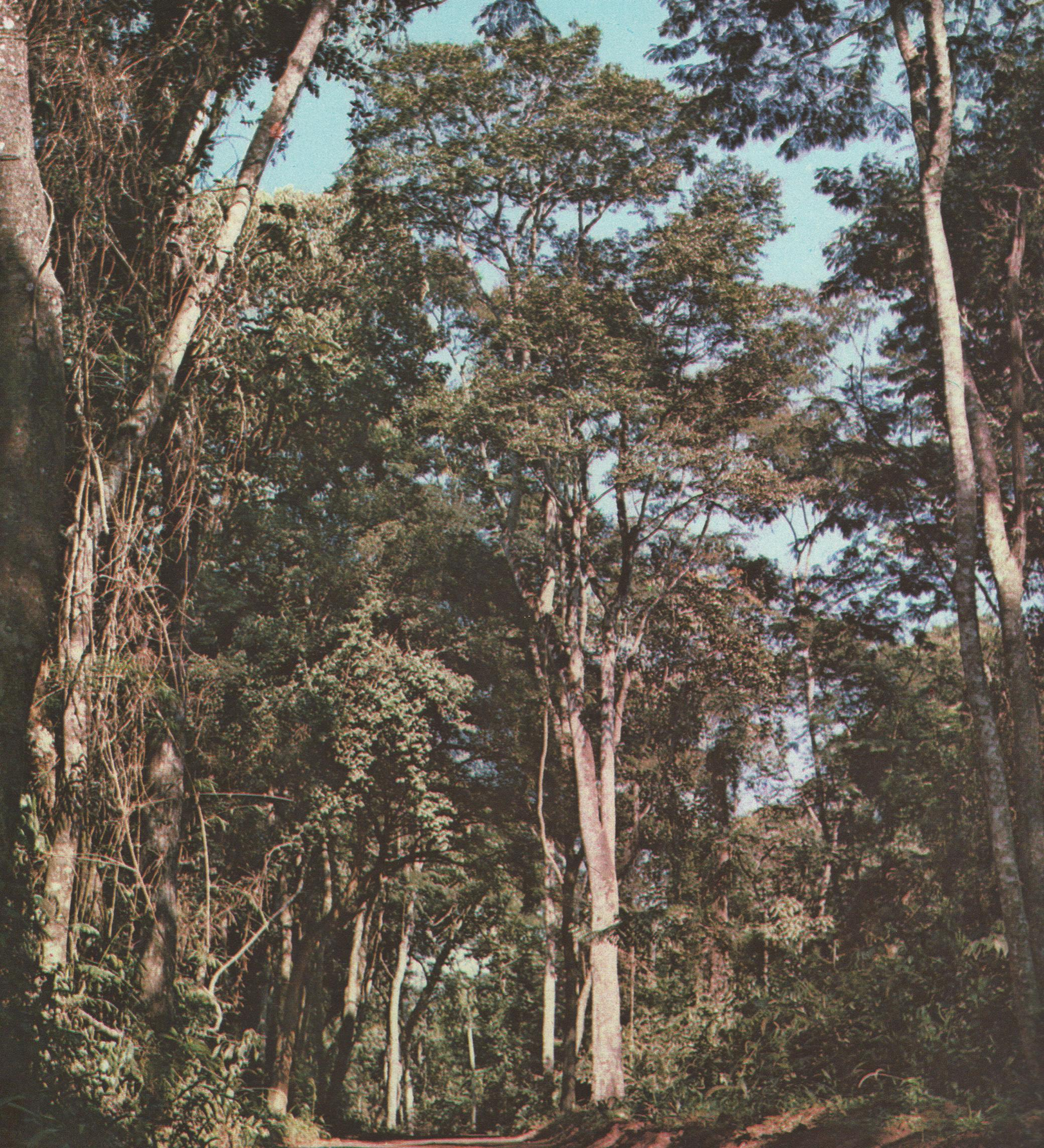 Ejemplar de Myrocarpus frondosus en la provincia de Misiones, Argentina.